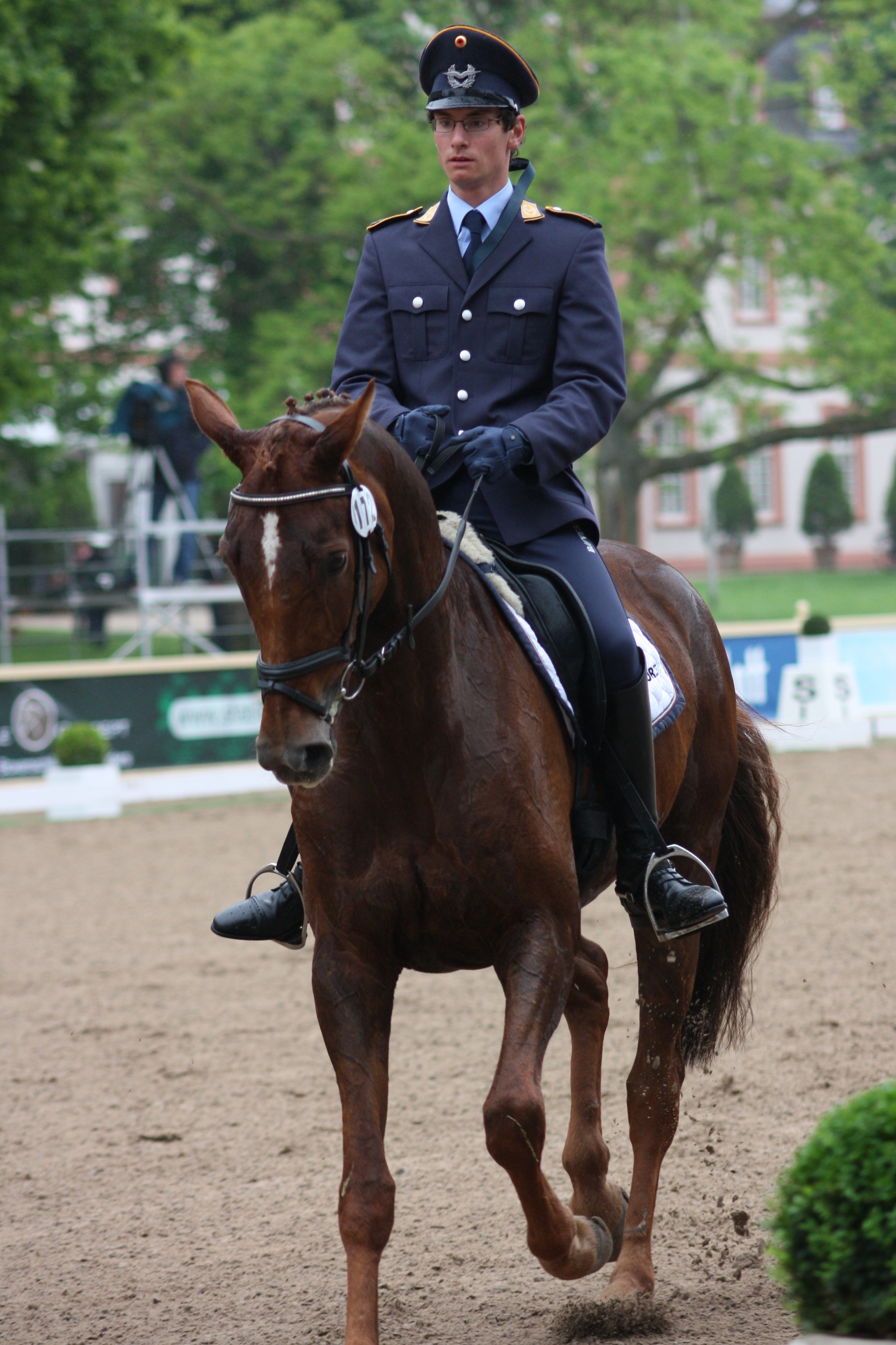 77. Internationanles Wiesbadener Pfingstunier 2013, CIC *** Vielseitigkeitsprüfung Dressur, Benjamin Winter auf Revenue Personality rights warningAlthough this work is freely licensed or in the public domain, the person(s) shown may have rights that legally restrict certain re-uses unless those depicted consent to such uses. In these cases, a model release or other evidence of consent could protect you from infringement claims.